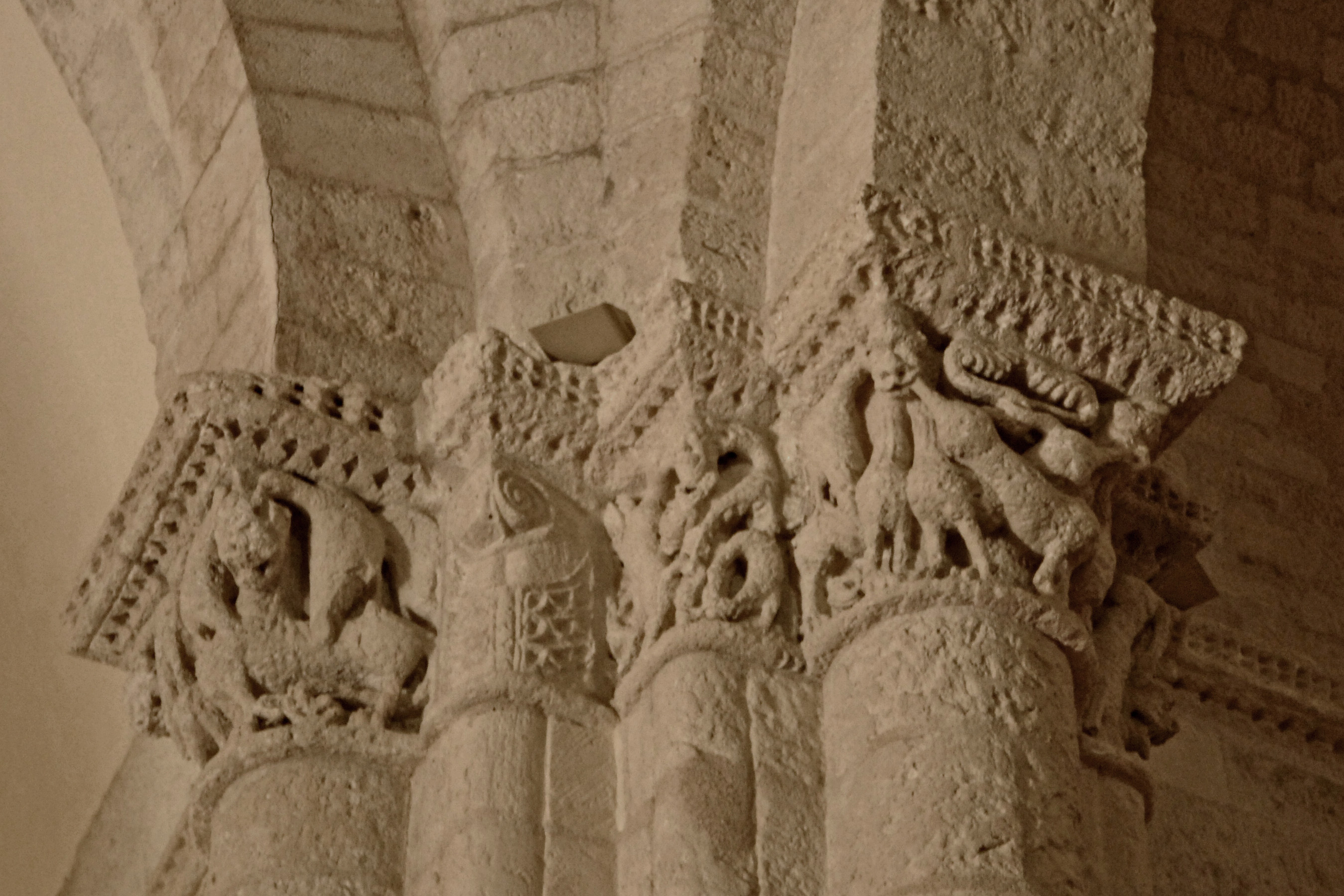 Sainte-Radegonde-Talmont-sur-Gironde, Vierungskapitelle